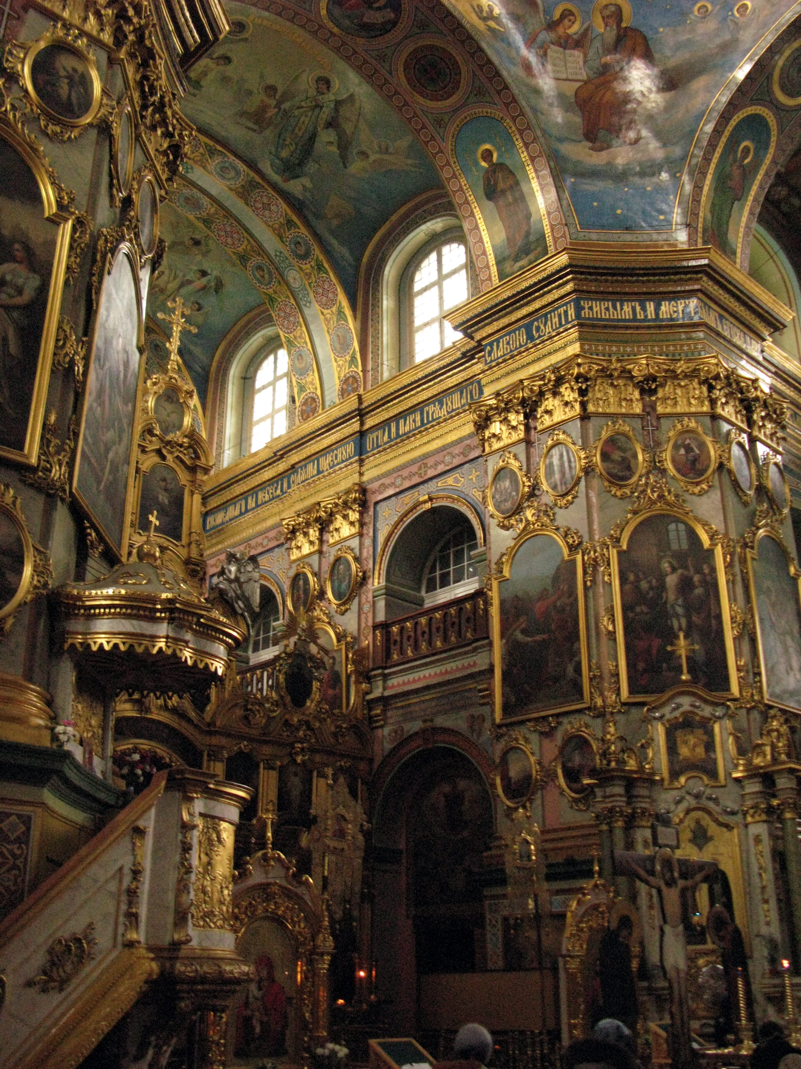 Успенський собор, Почаїв, пл. Возз'єднання